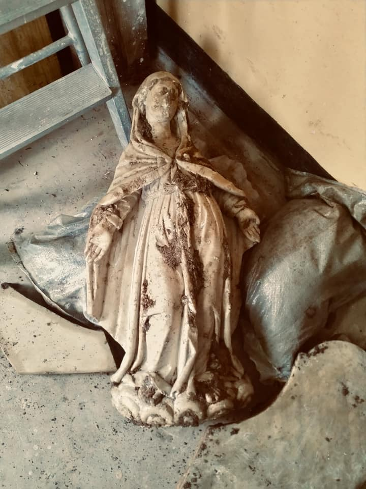 Il ritrovamento della Madonna intatta